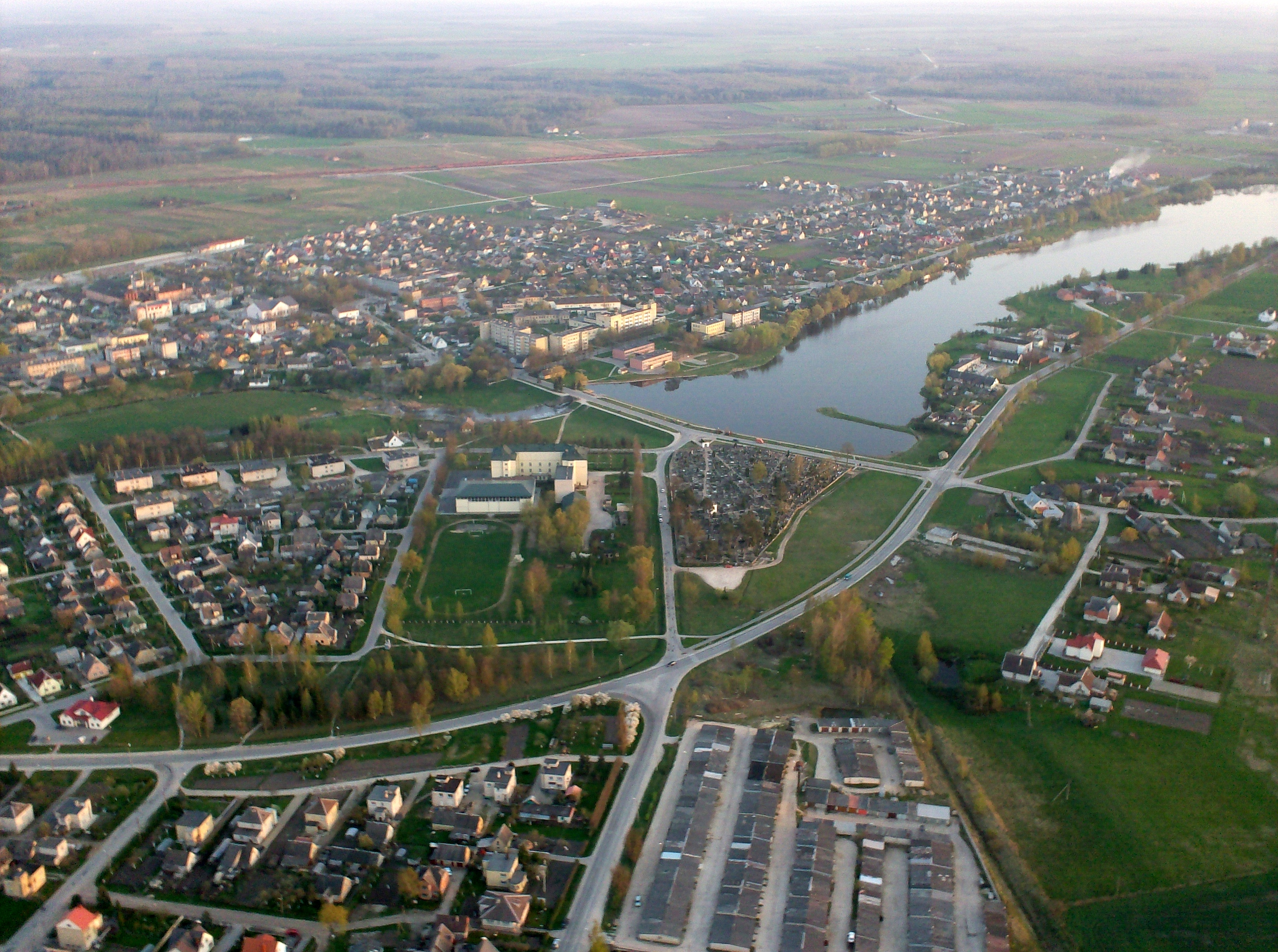 Pakruojis. Fotografuota 2008-04-28.